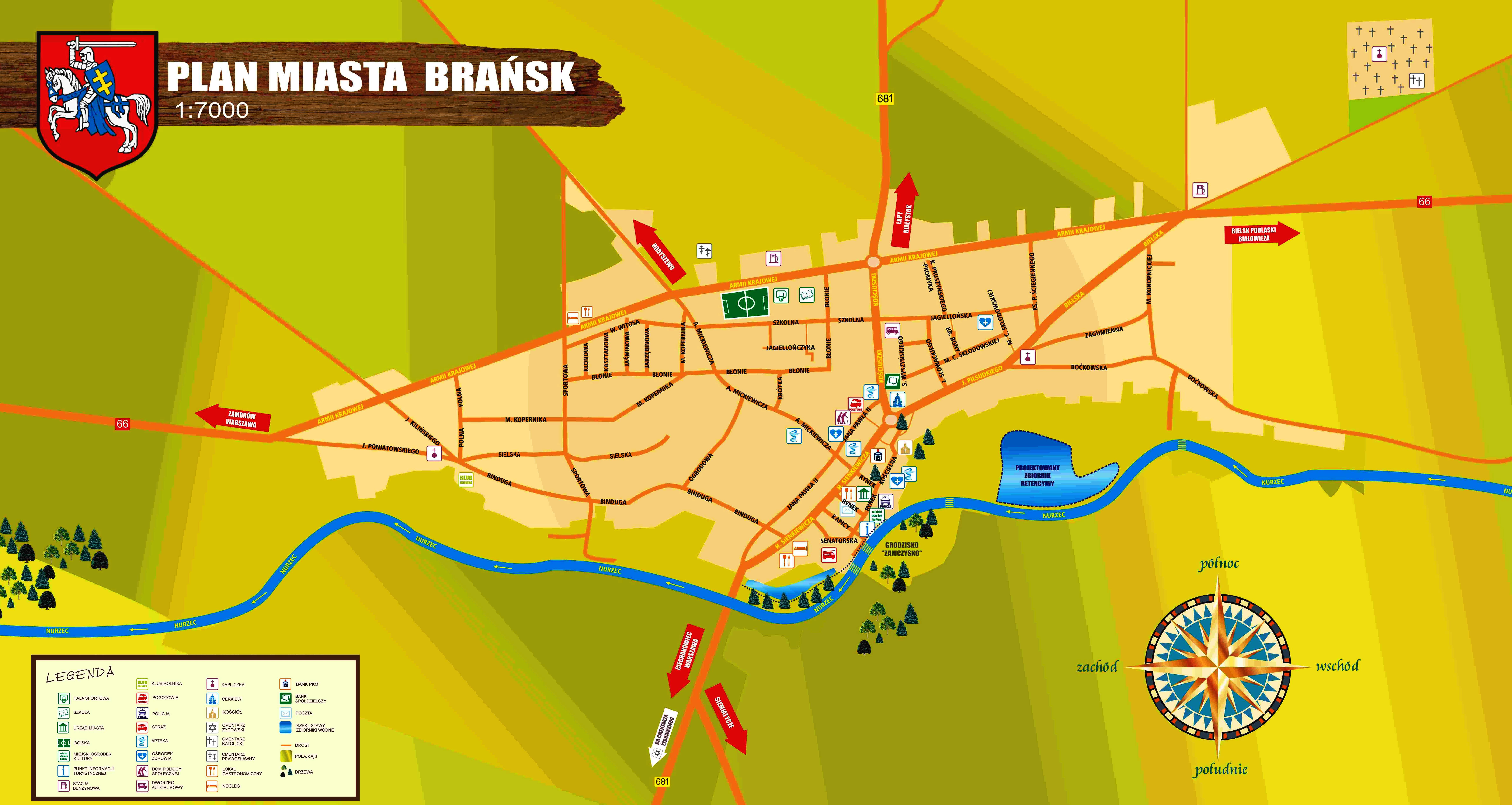 Mapa miasta Brańsk.